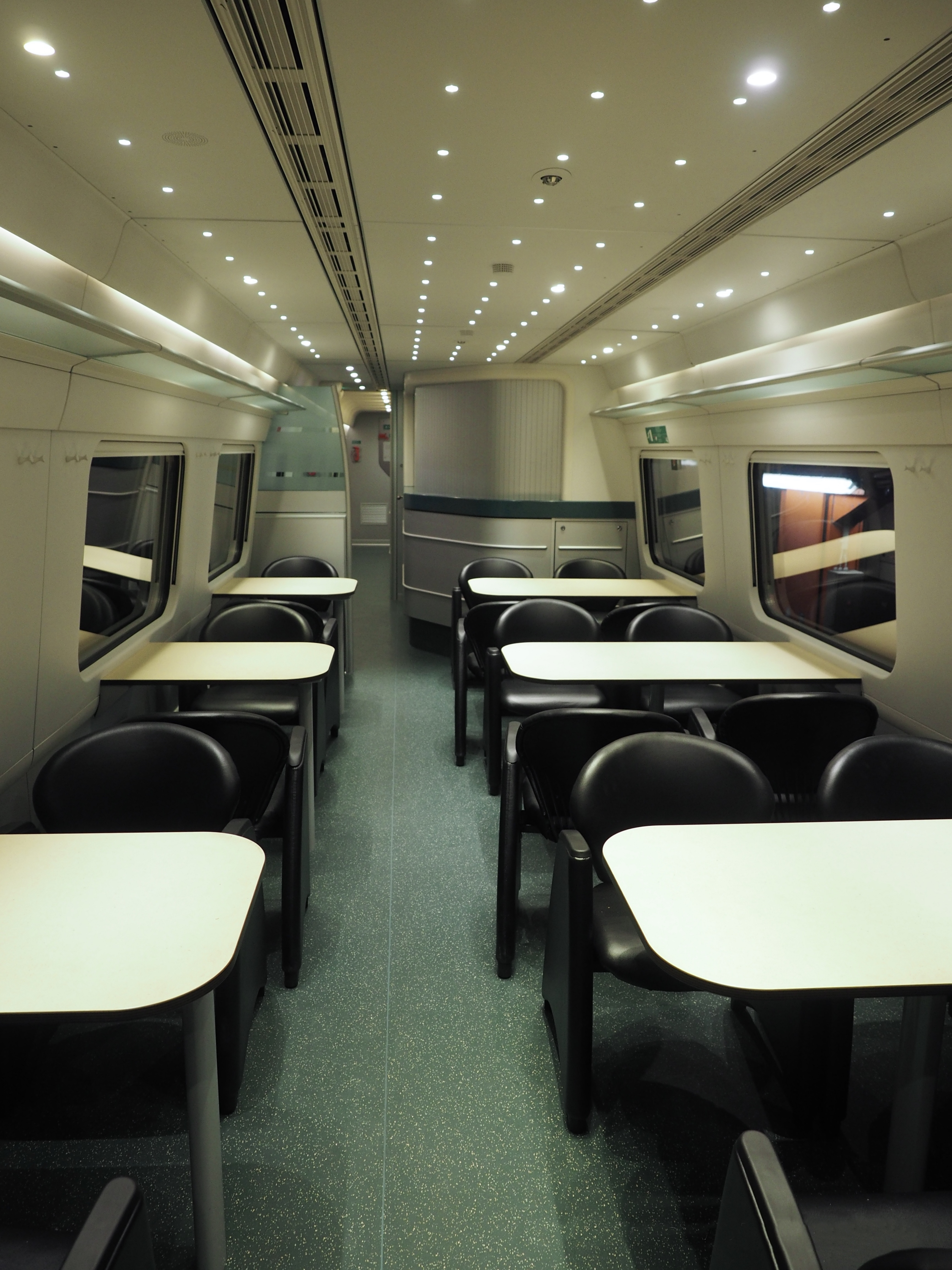 Genève 29.11.2014